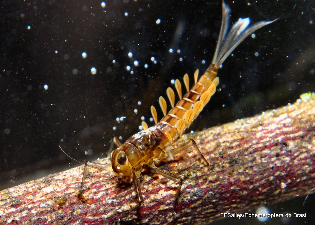 ephemeroptera ninfa